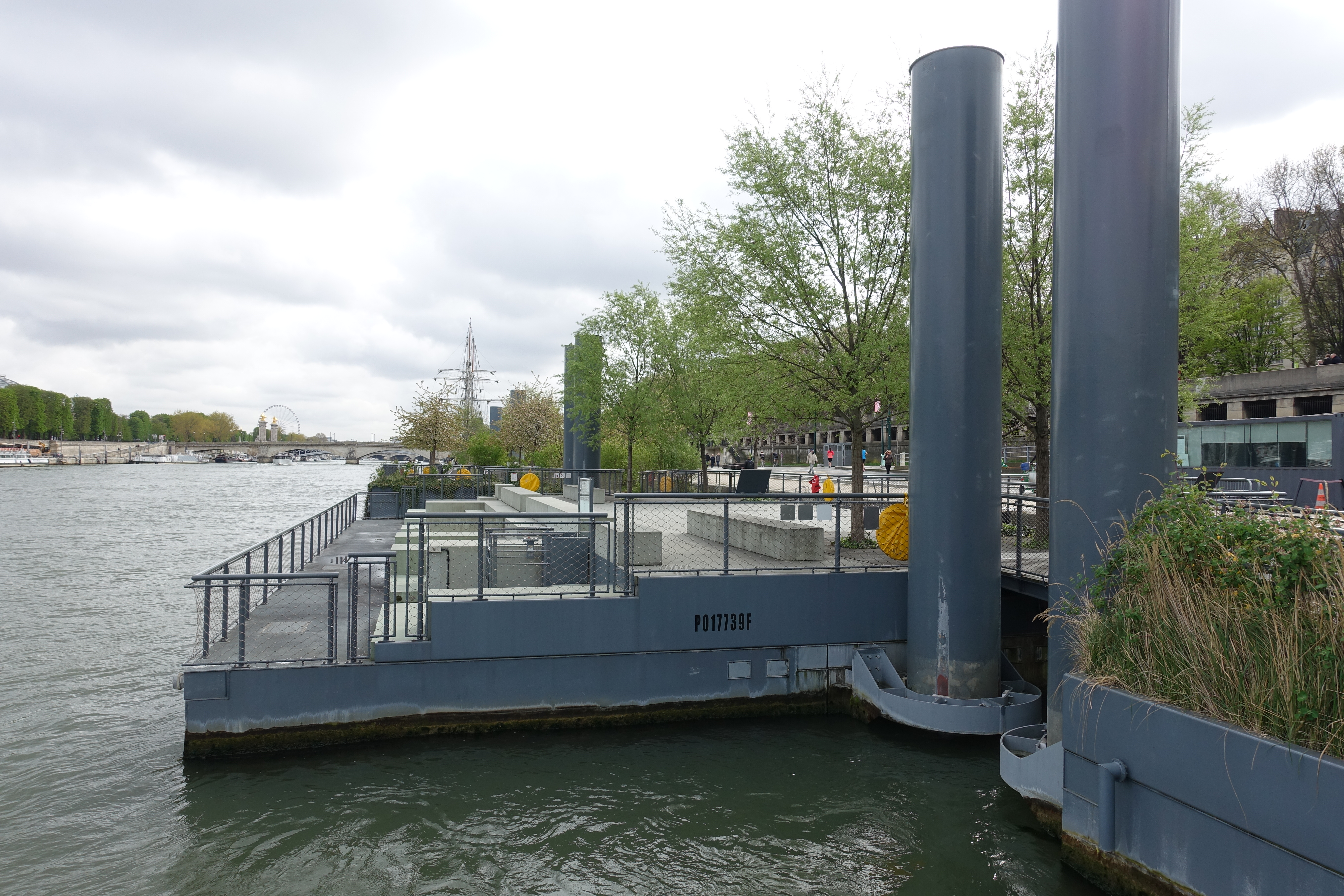 Archipel des Berges de la Seine - Niki de Saint-Phalle @ Parc Rives de Seine @ Paris